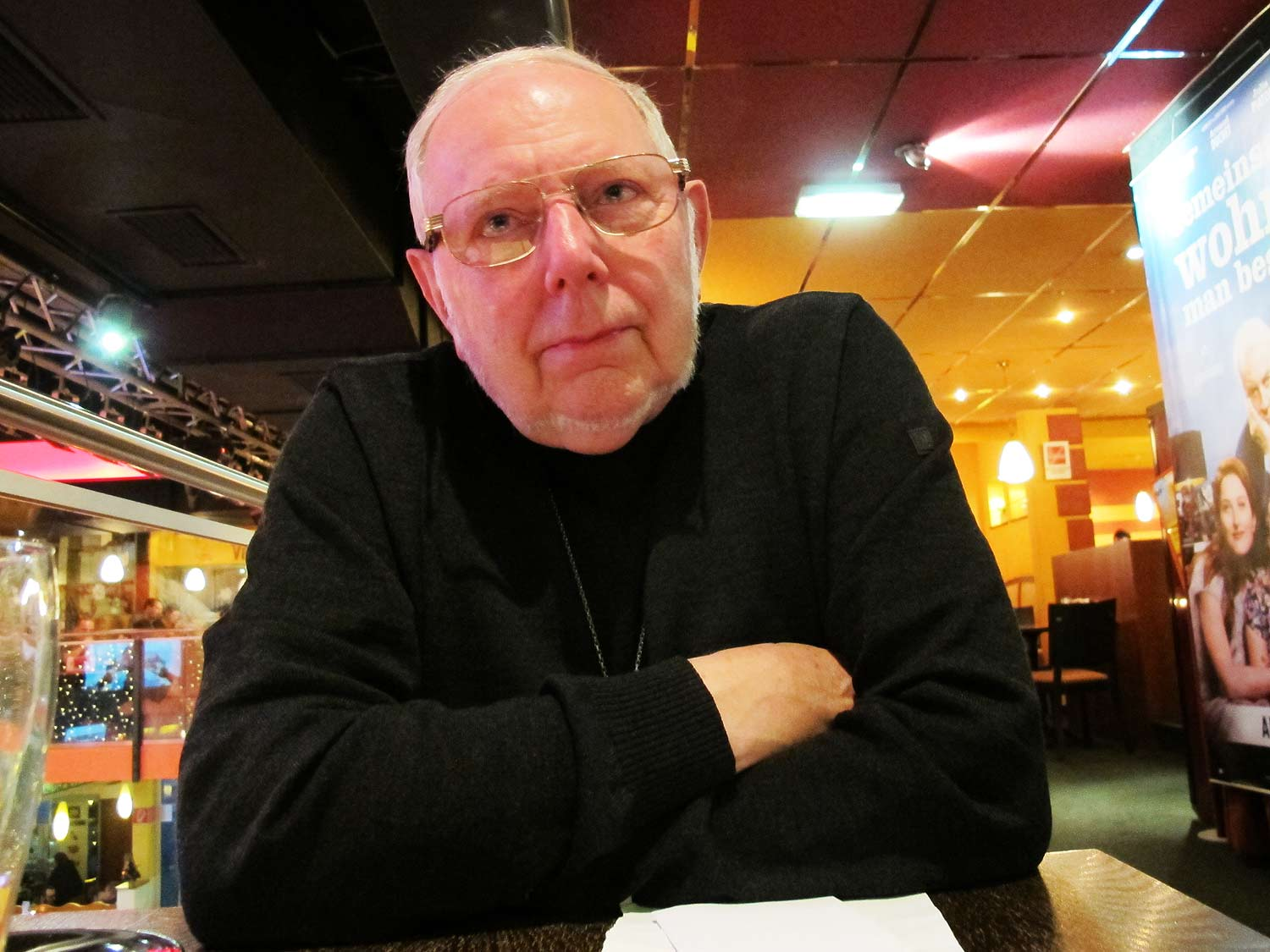 Univ.-Prof. Dr.Dr. h.c. mult. Hermann Maurer, MAE